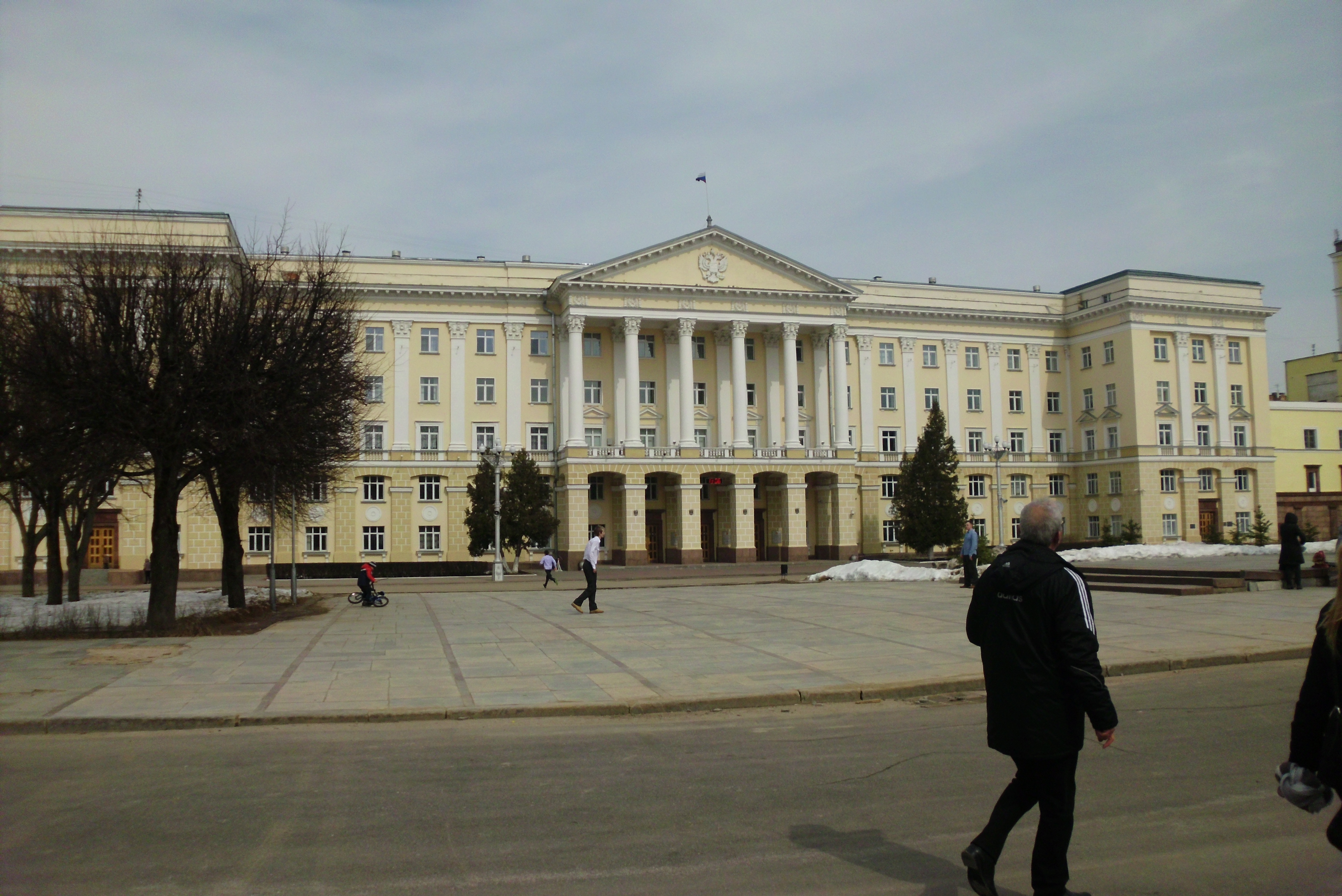 Kwiecień 2013 Government building of Smolensk Oblast